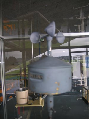 Anemometer.